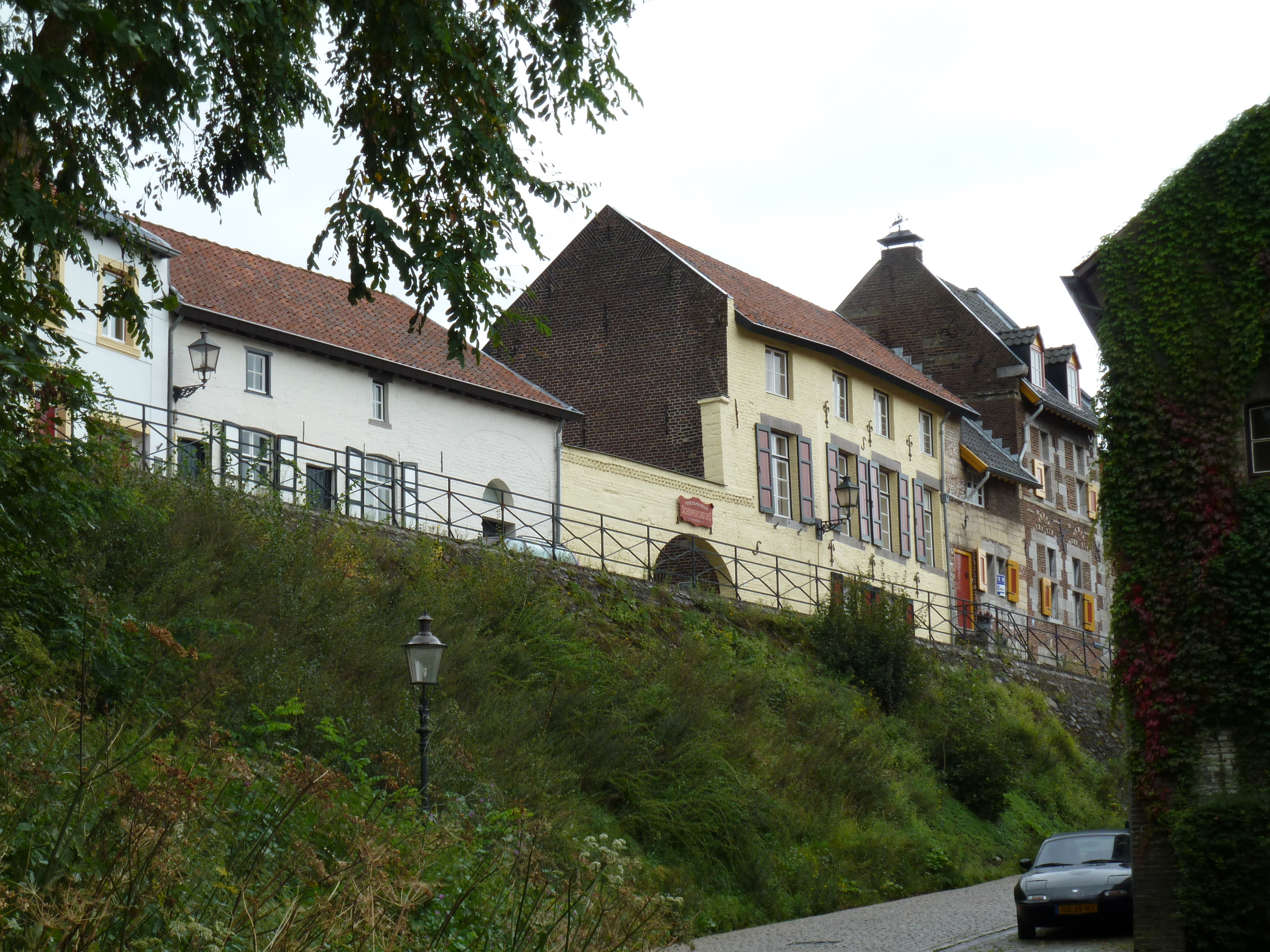 Op de Berg gezien vanaf de Maasberg, Elsloo, Limburg, Nederland